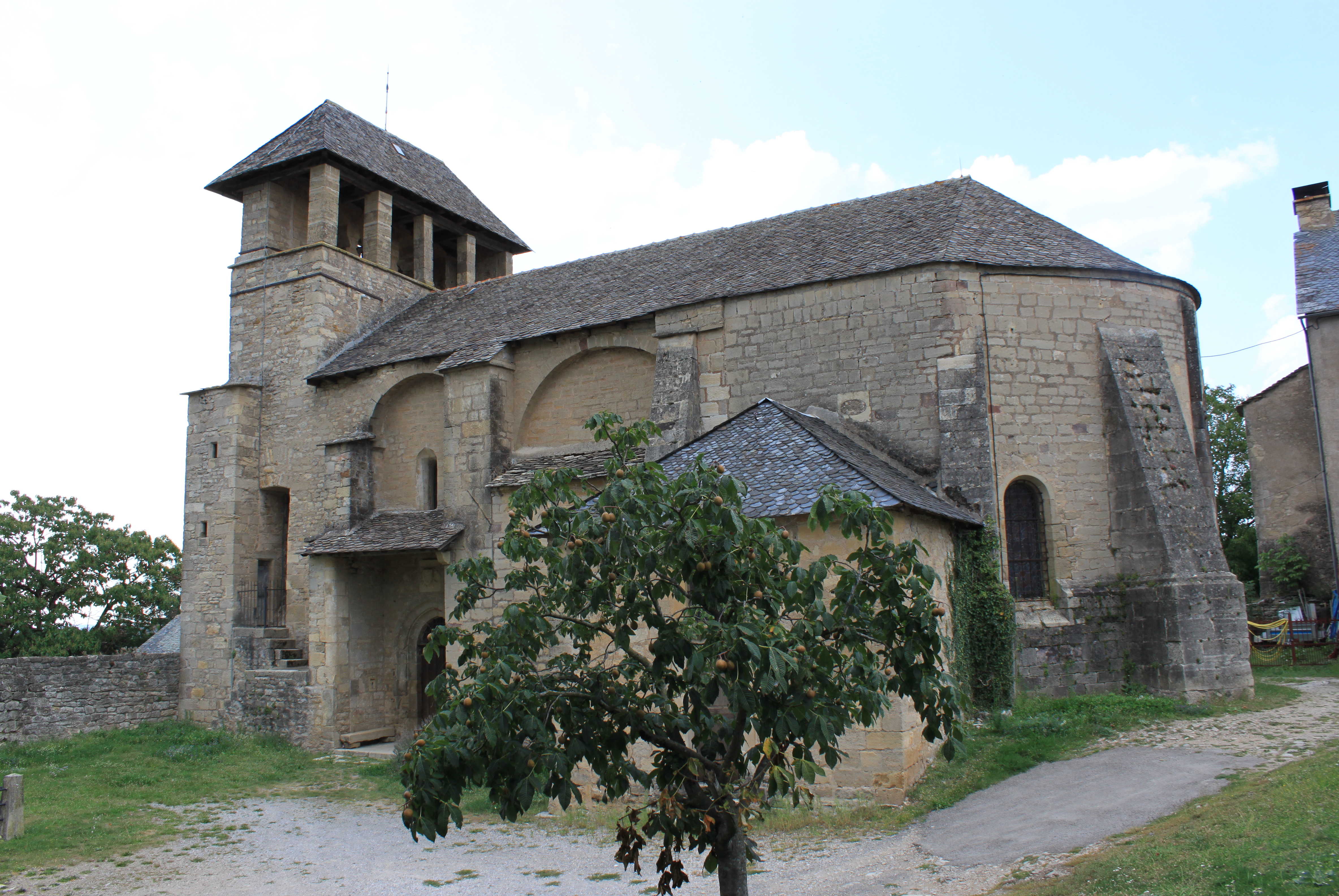 Église de Palmas (Aveyron) PA00094096